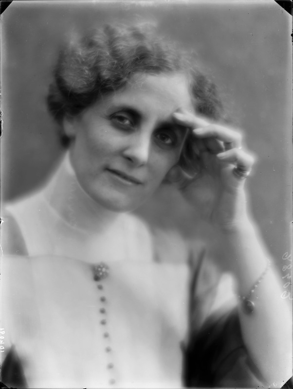 Amelia Pincherle Rosselli fotografata da Mario Nunes Vais